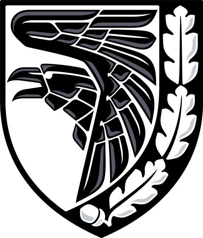 Нарукавний знак, 93-тя окрема механізована бригада